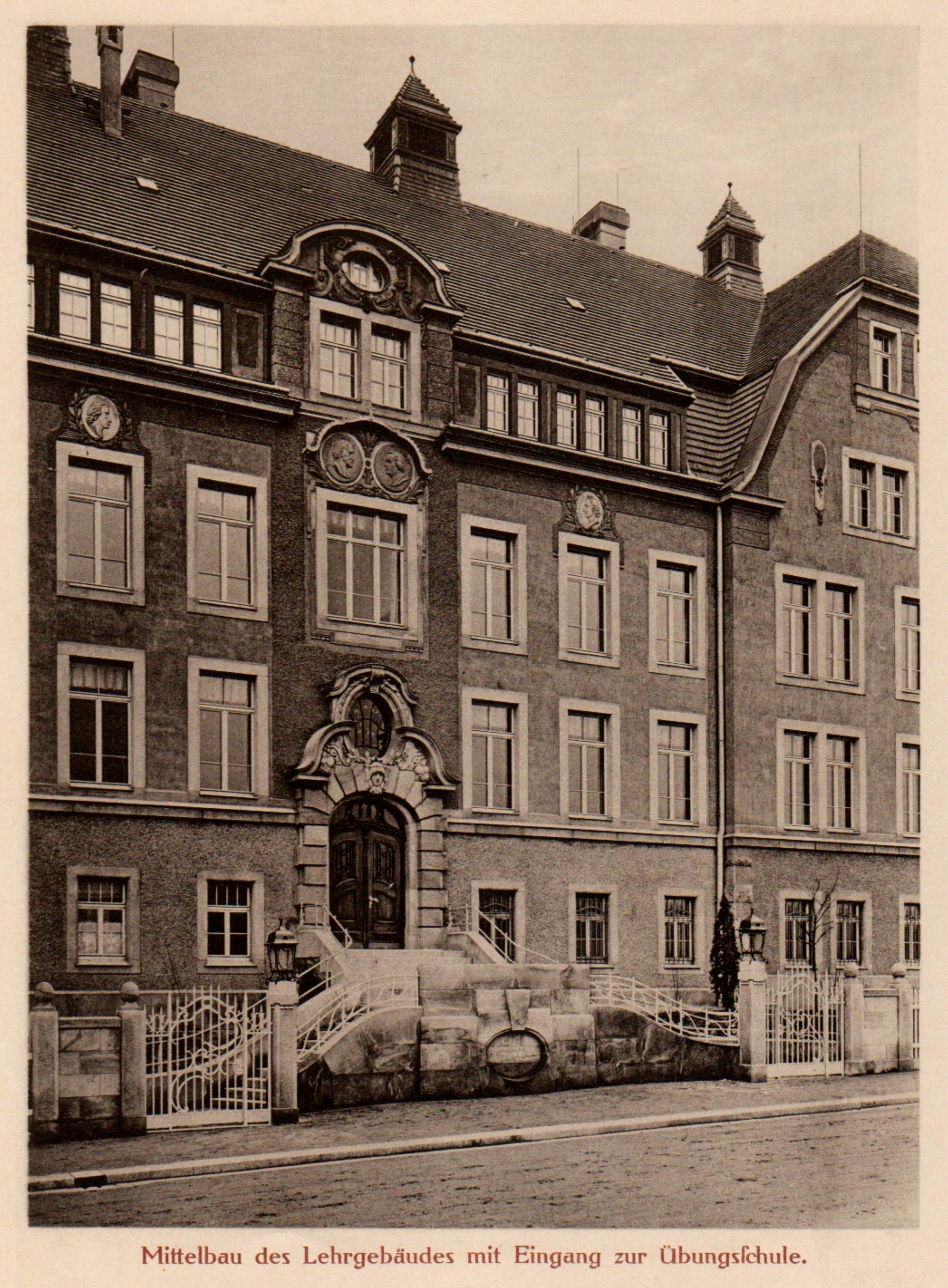 Dresden, Königliches Lehrerseminar Dresden-Strehlen (nach Wiederaufbau TU-Gebäude am Weberplatz) – Mittelbau Übungsschule 1910